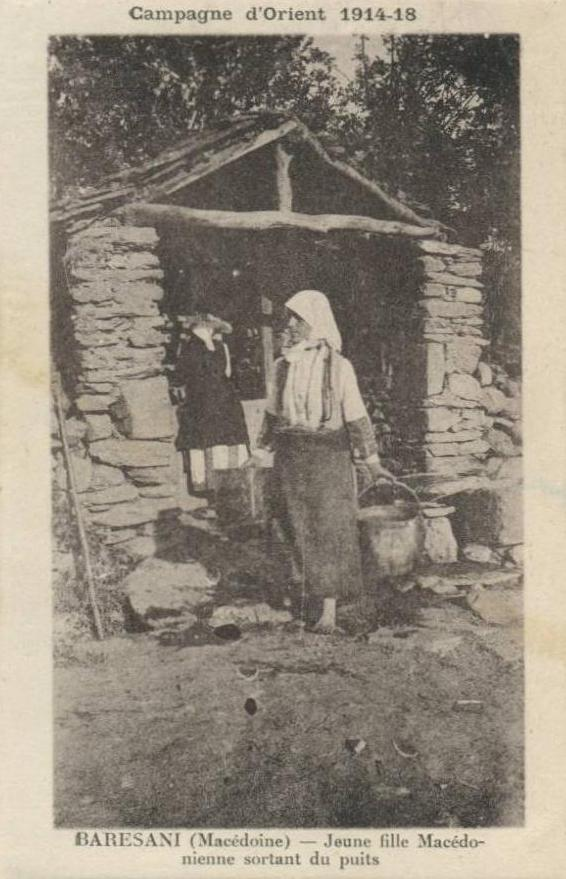 Жена в Барешани през Първата световна война